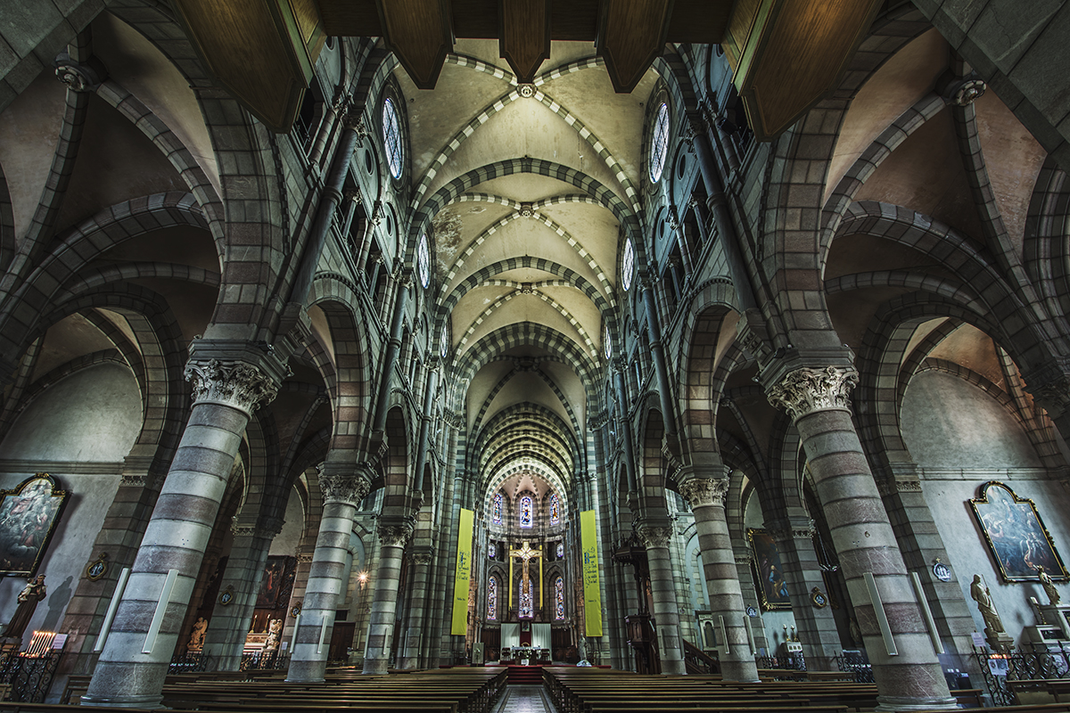 Interno della Cattedrale Notre-Dame-et-Saint-Arnoux di Gap.